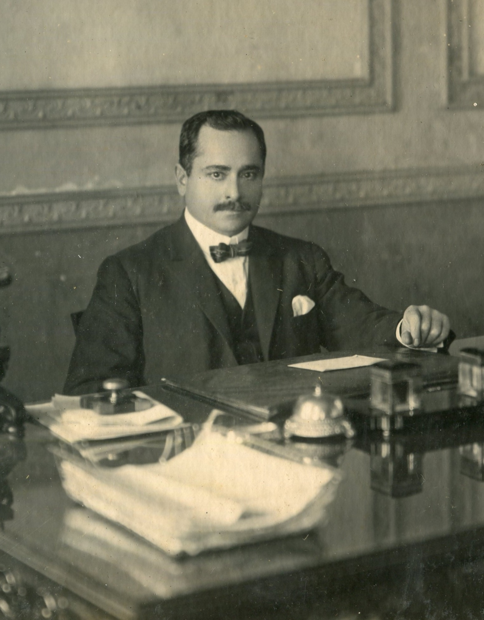 Luis Riart. Gobernante del Paraguay